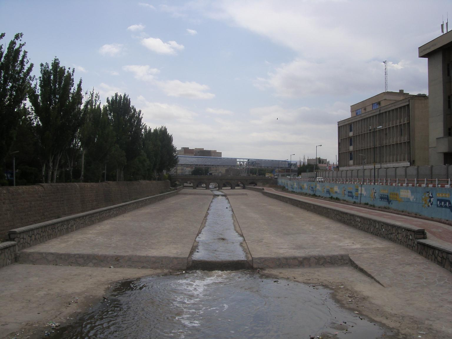 Mehran River, Tabriz, Iran